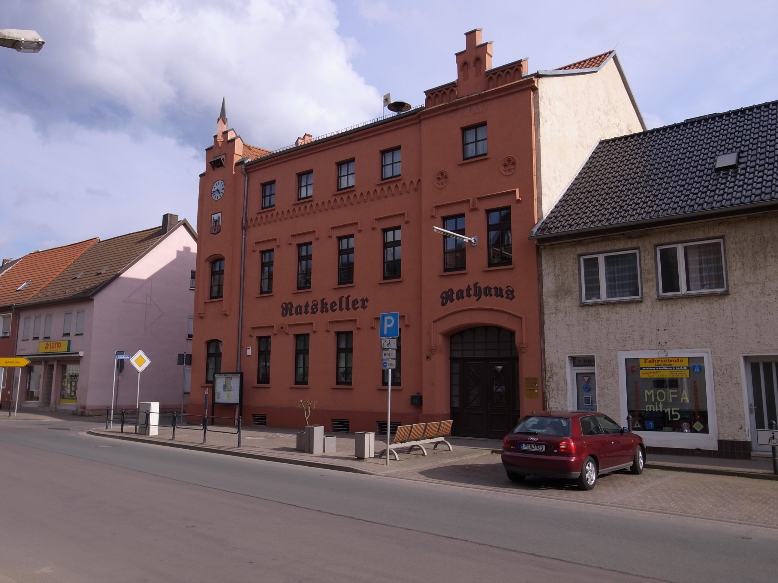 Raguhn,Rathaus